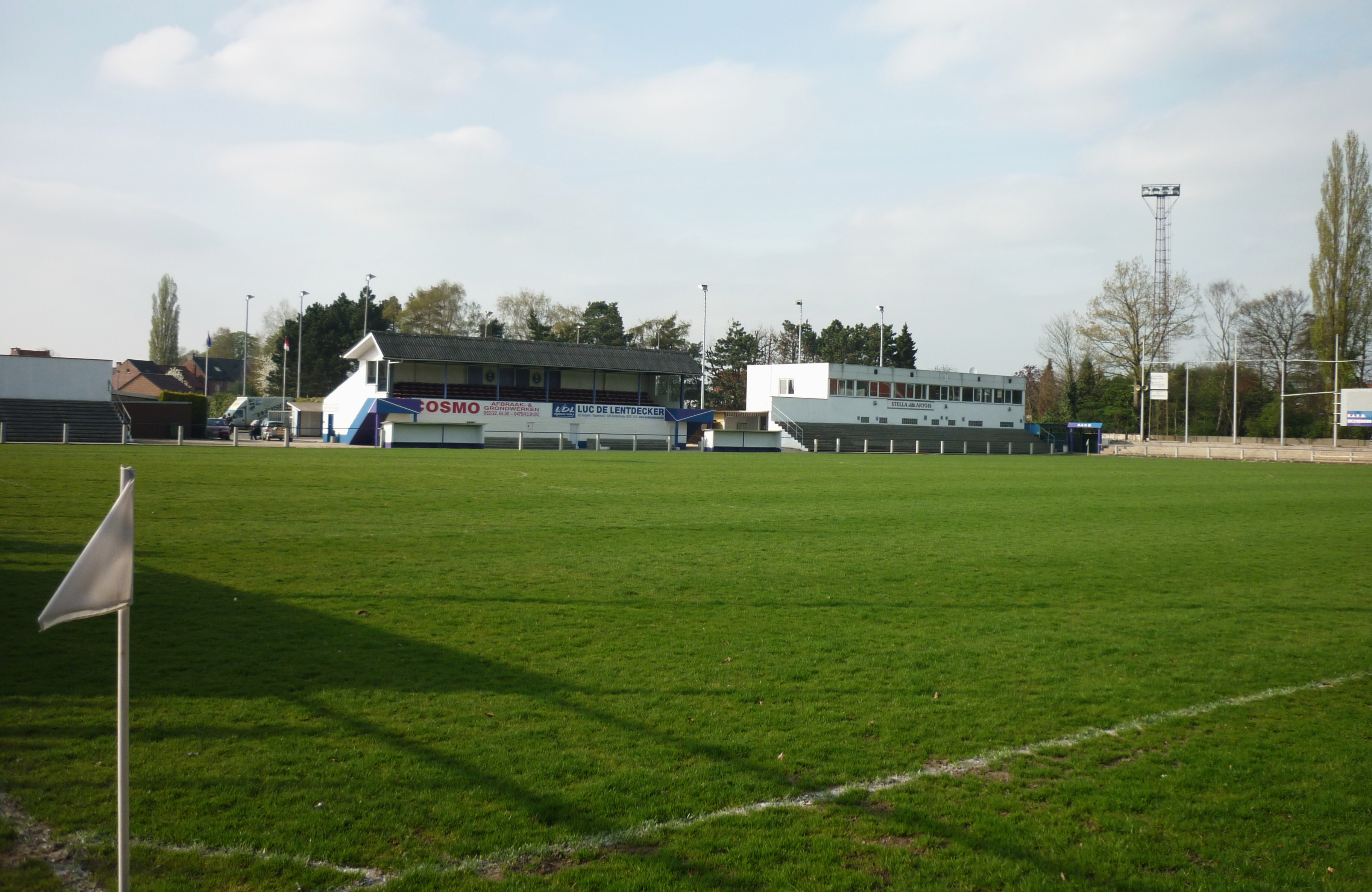 Overzicht van de accommodatie op het A-terrein van voetbalclub KAV Dendermonde.